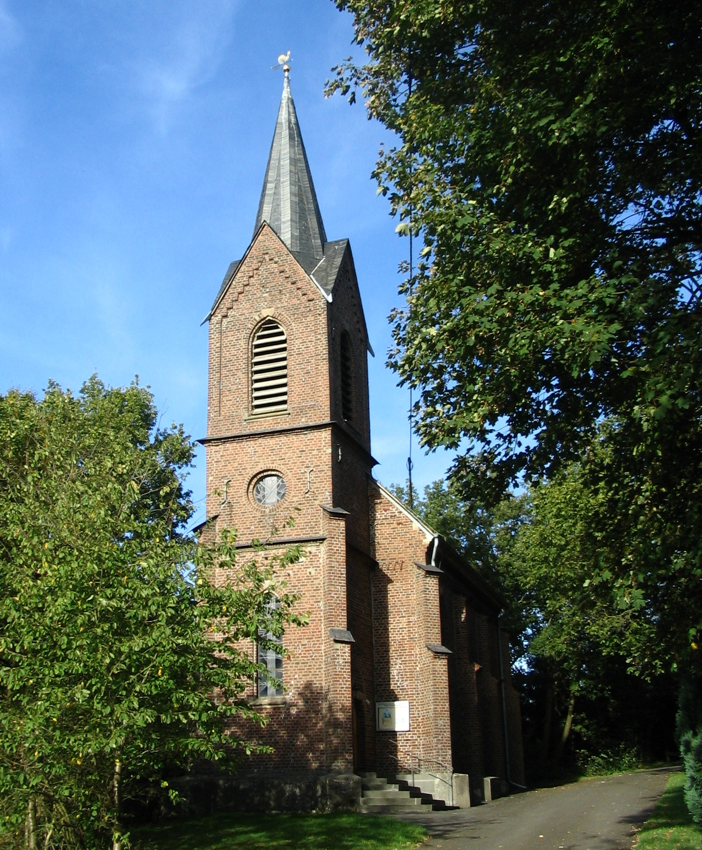 Todenroth, ev. Kapelle